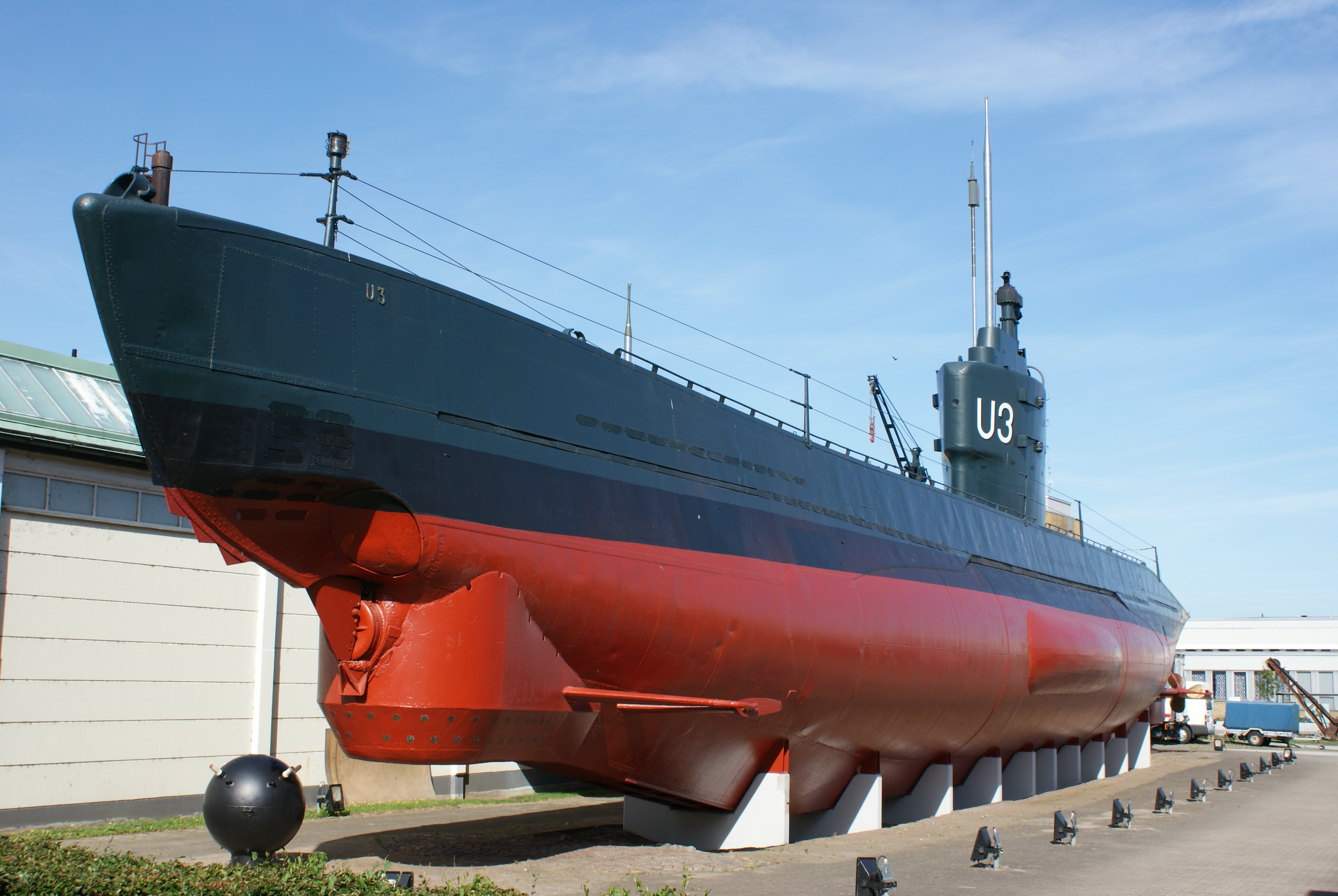 U-Boot HMS U3 der schwedischen Marine im Technik Museum Malmö 01.08.09.